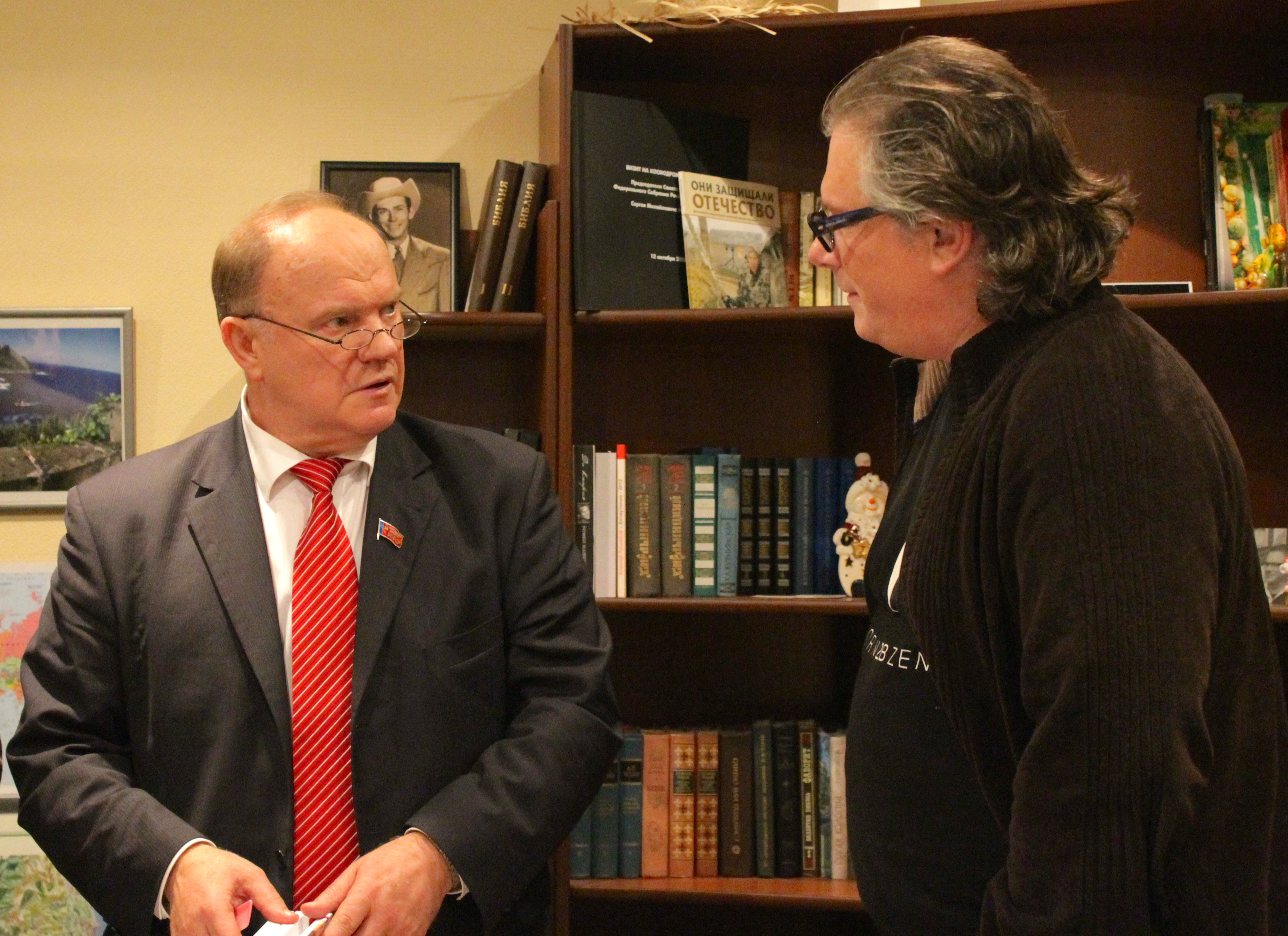 Алексей Лушников